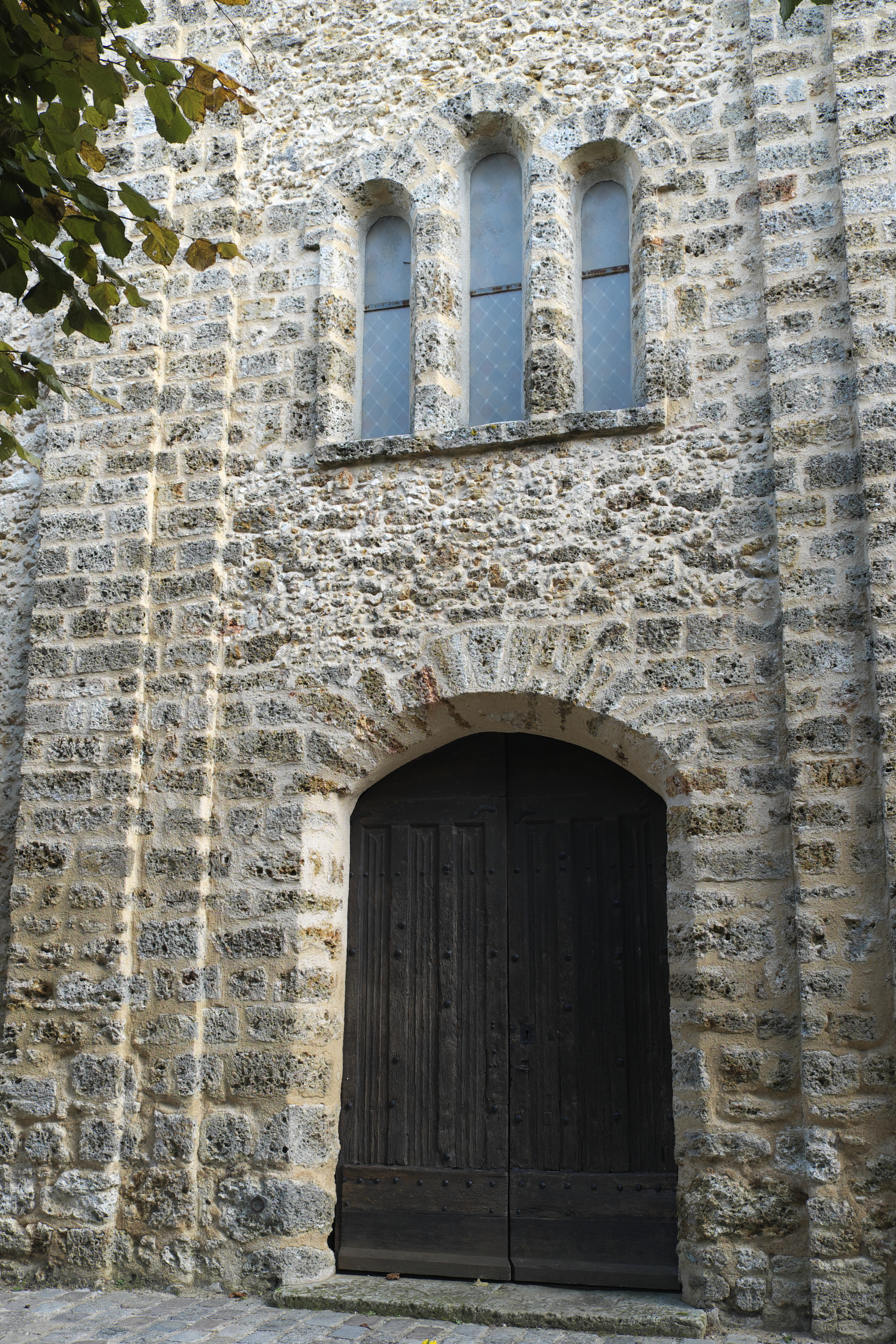 Katholische Kirche Saint-Germain-d’Auxerre in Coignières im Département Yvelines (Île-de-France/Frankreich), Hauptportal